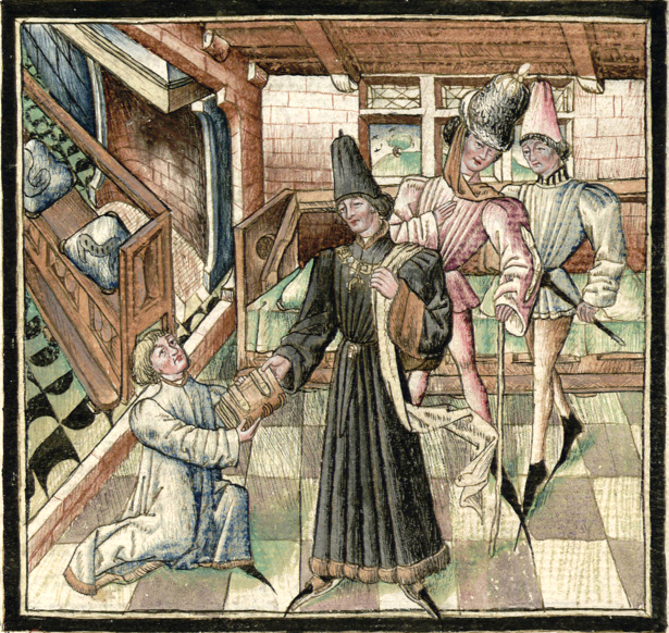 ChampionDesDames-Grenoble-Ms0352-f001r Présentation du Manuscrit